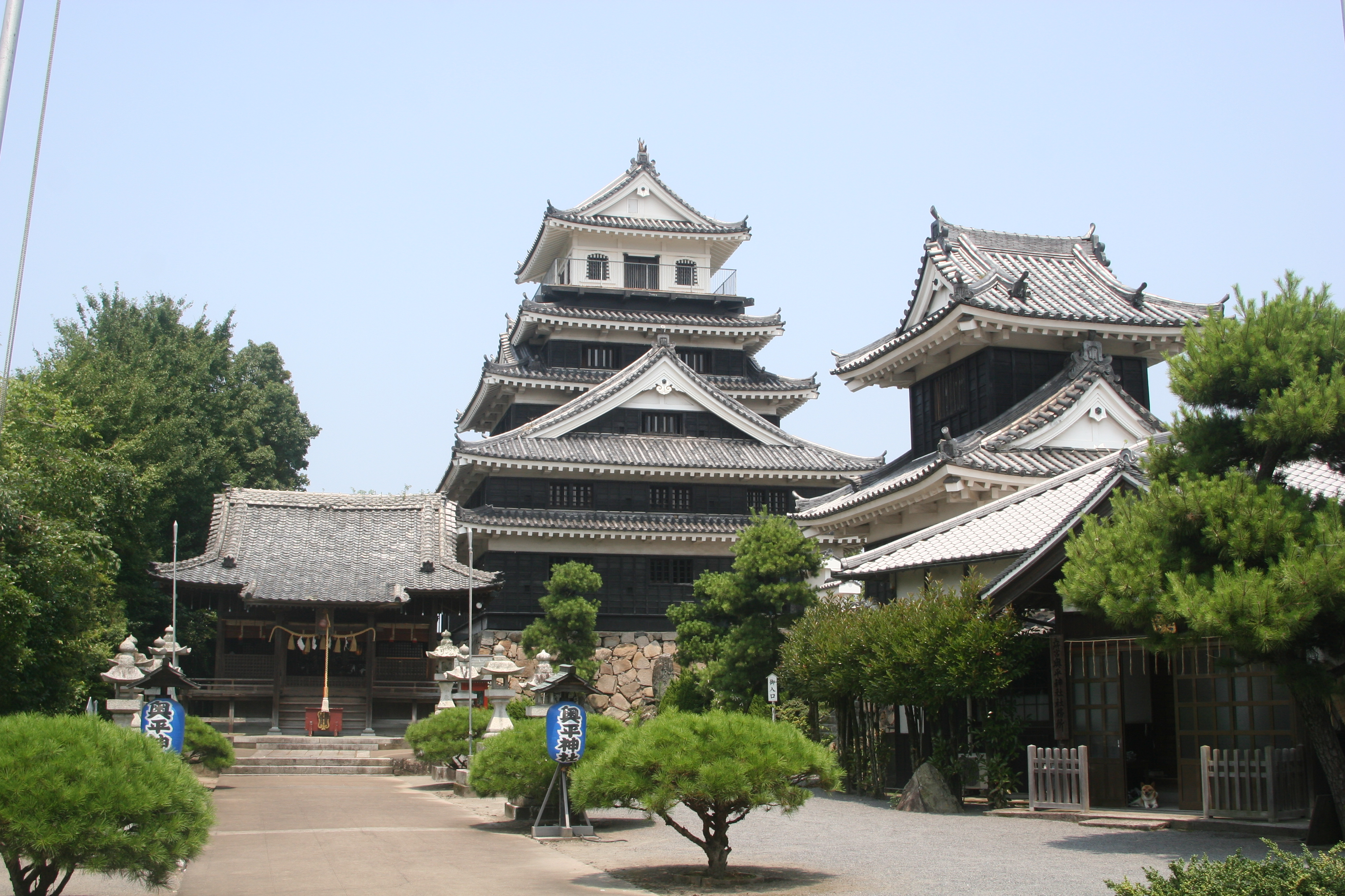 Nakatsu Castle at Oita ,Kyusyu,Japan.